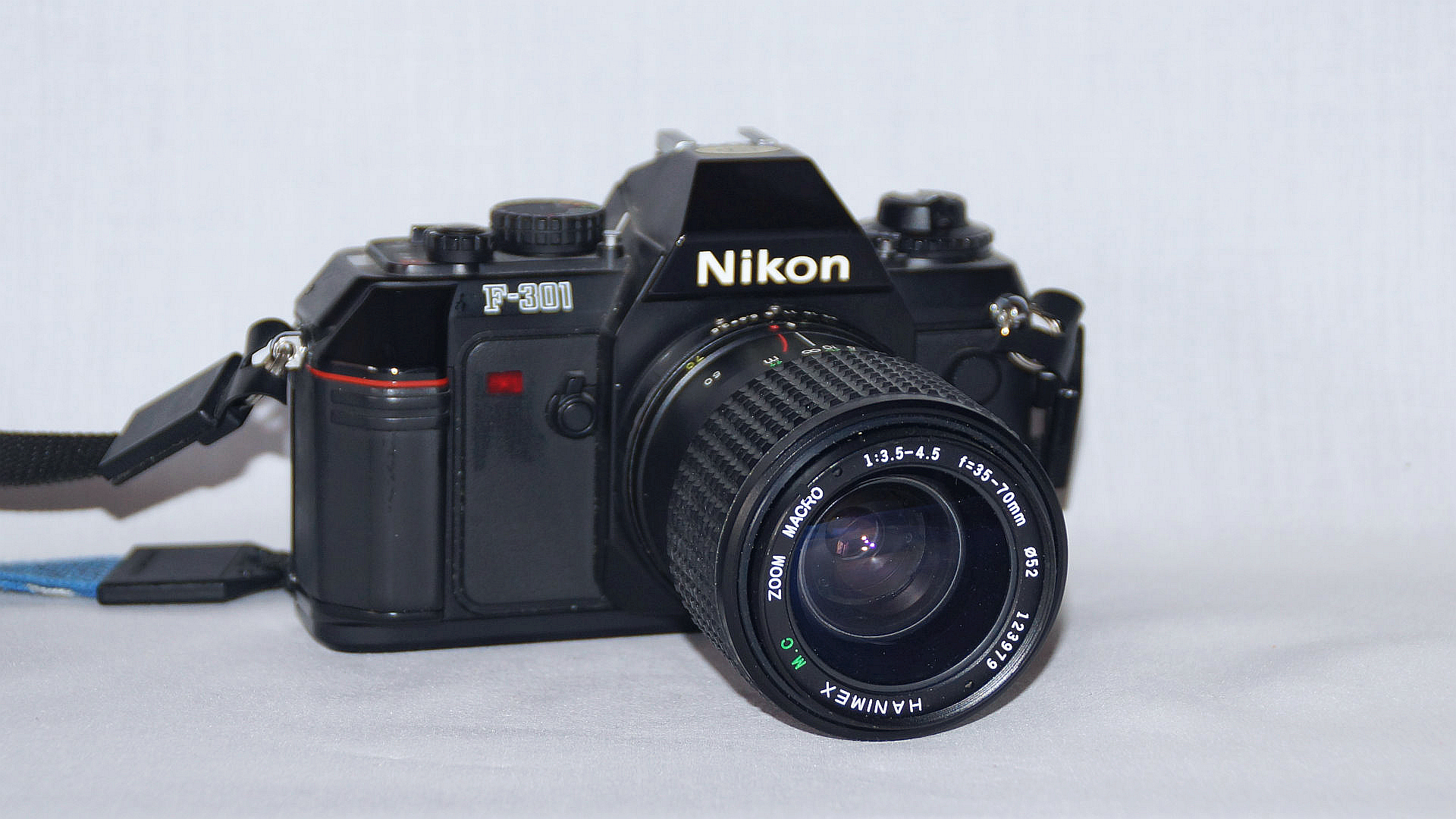 Nikon F-301 mit Makro-Zoom 35-70mm - Foto 2019 Wolfgang Pehlemann DSC04858